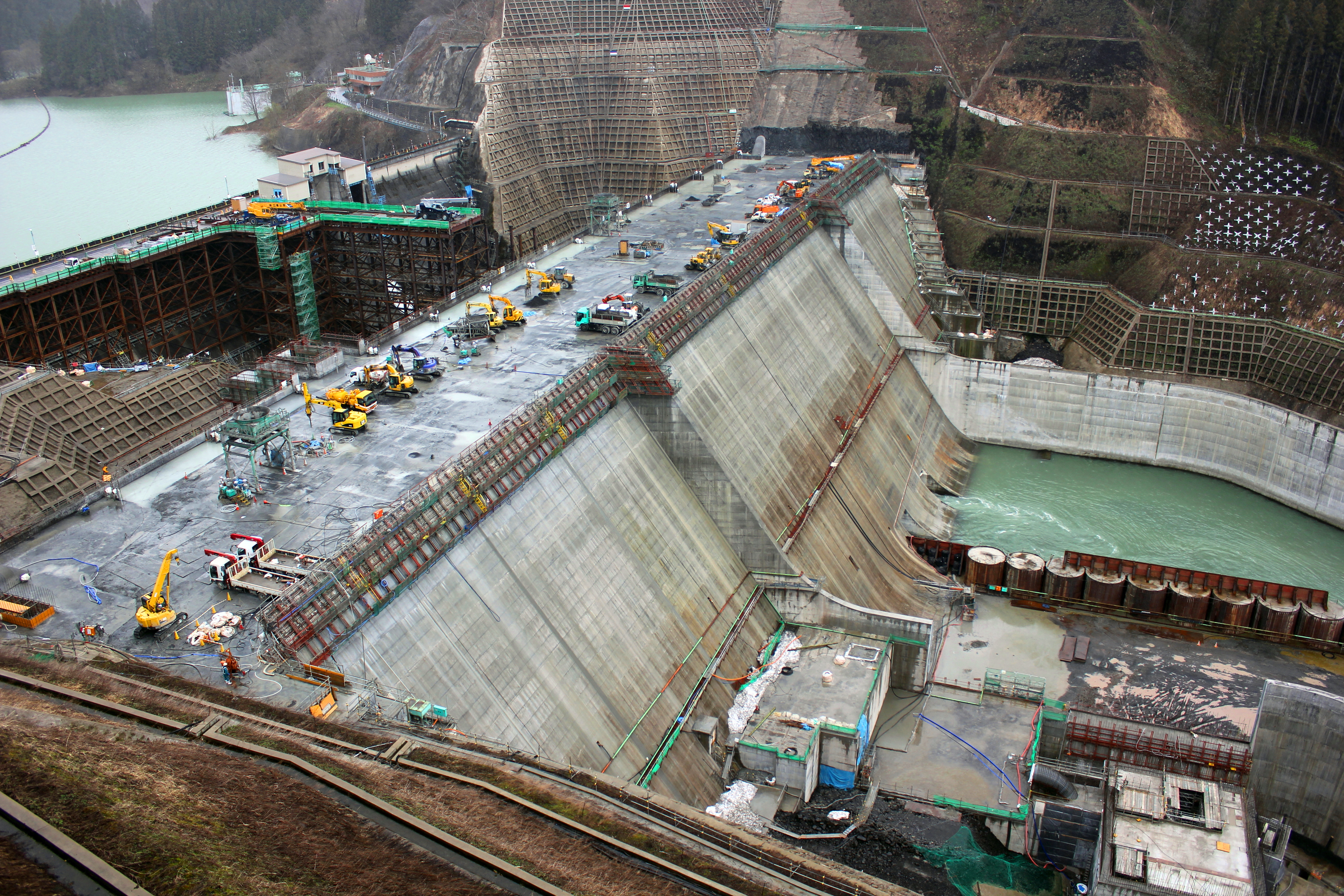 津軽ダム（2013年撮影時）